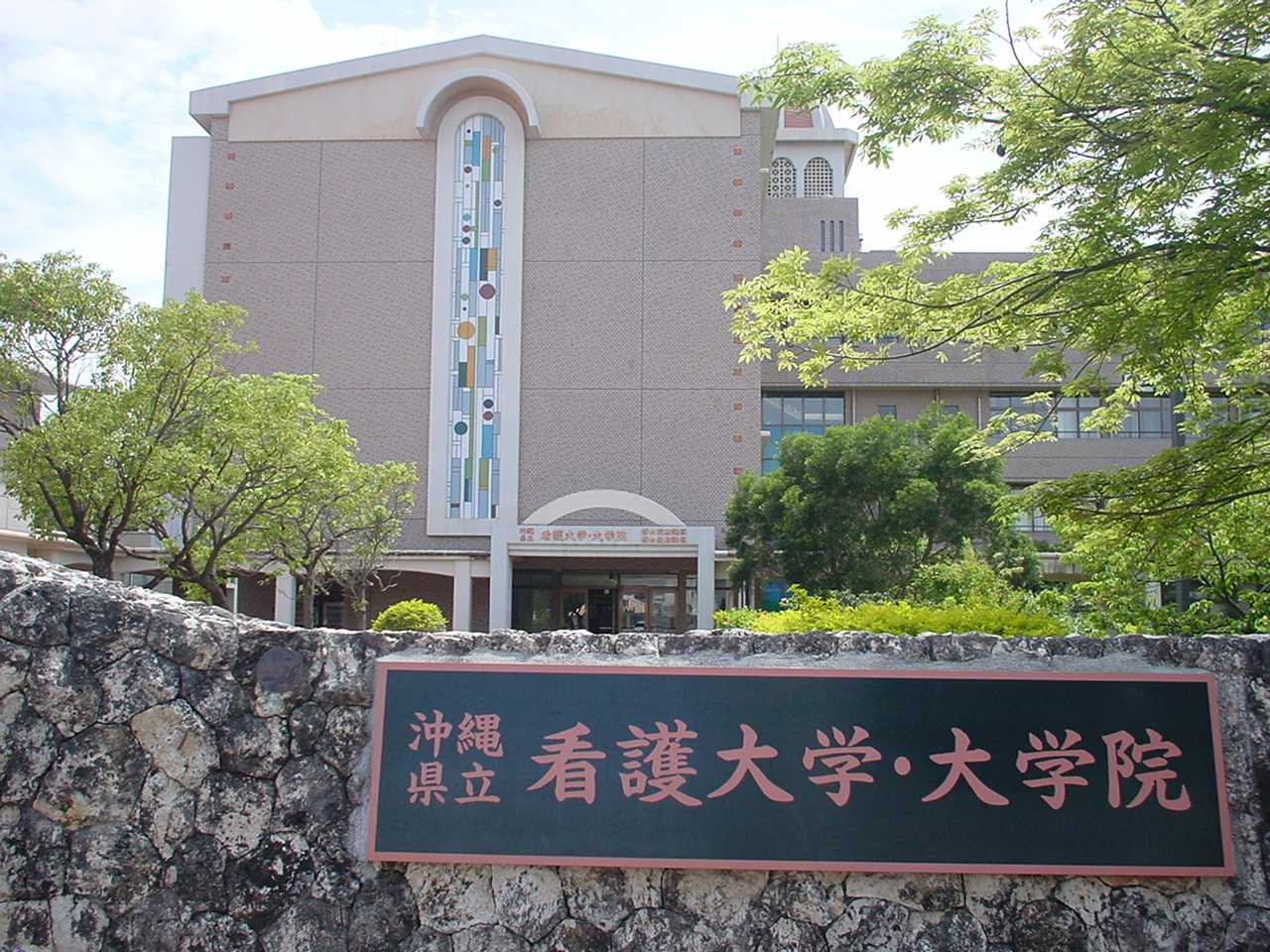 沖縄県立看護大学（2006年4月30日投稿者が撮影）